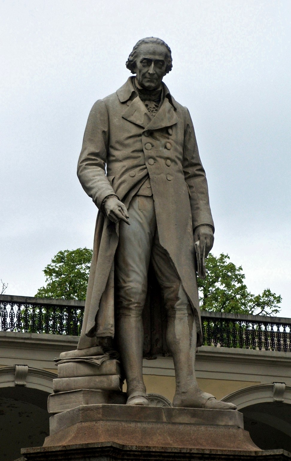 Statua a Luigi Lagrange (Joseph-Louis Lagrange) - via Lagrange - Torino